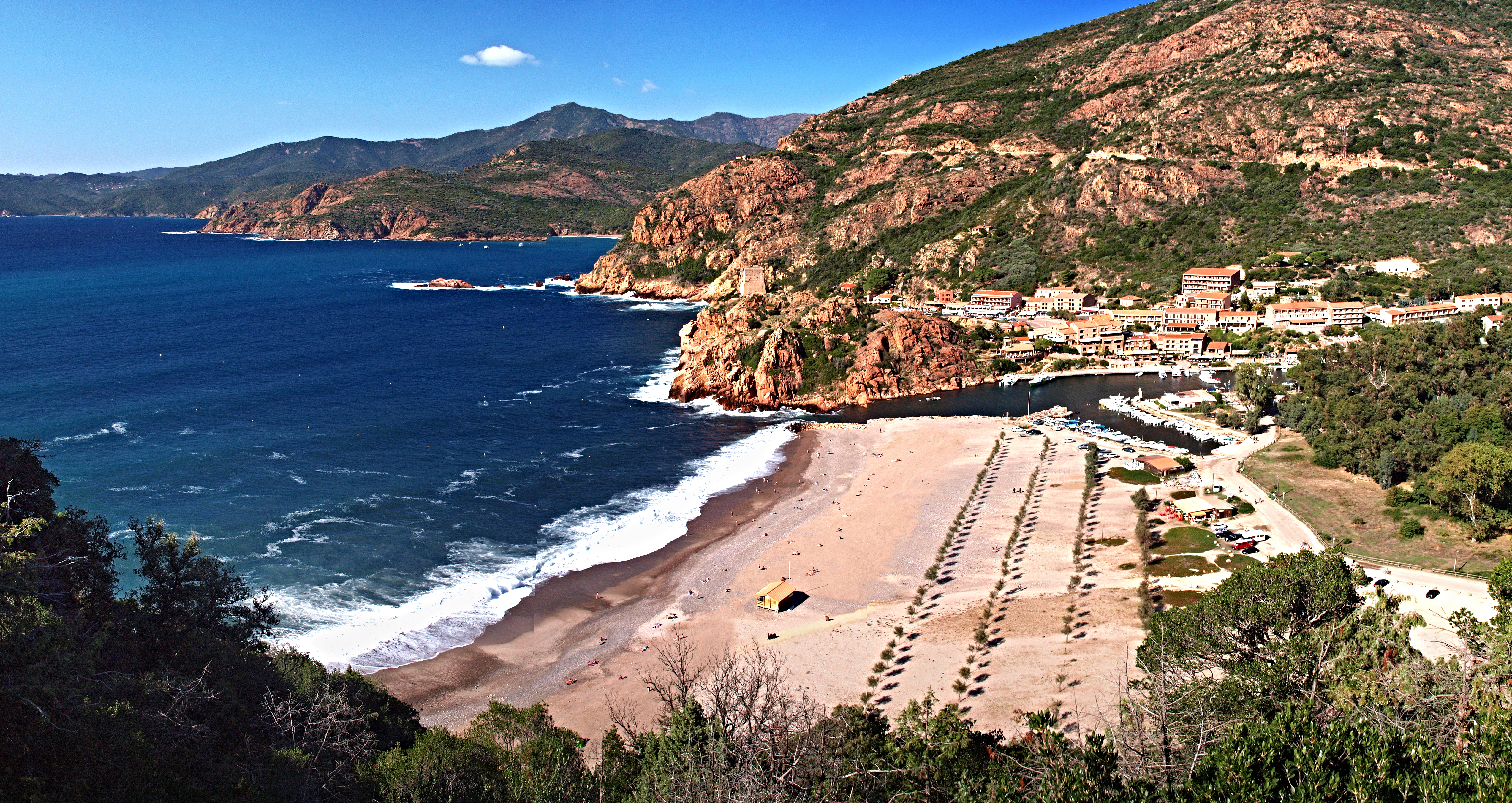 Ota (Corsica) - Porto Marina, la plage et la tour génoise, à l'embouchure de la rivière Porto